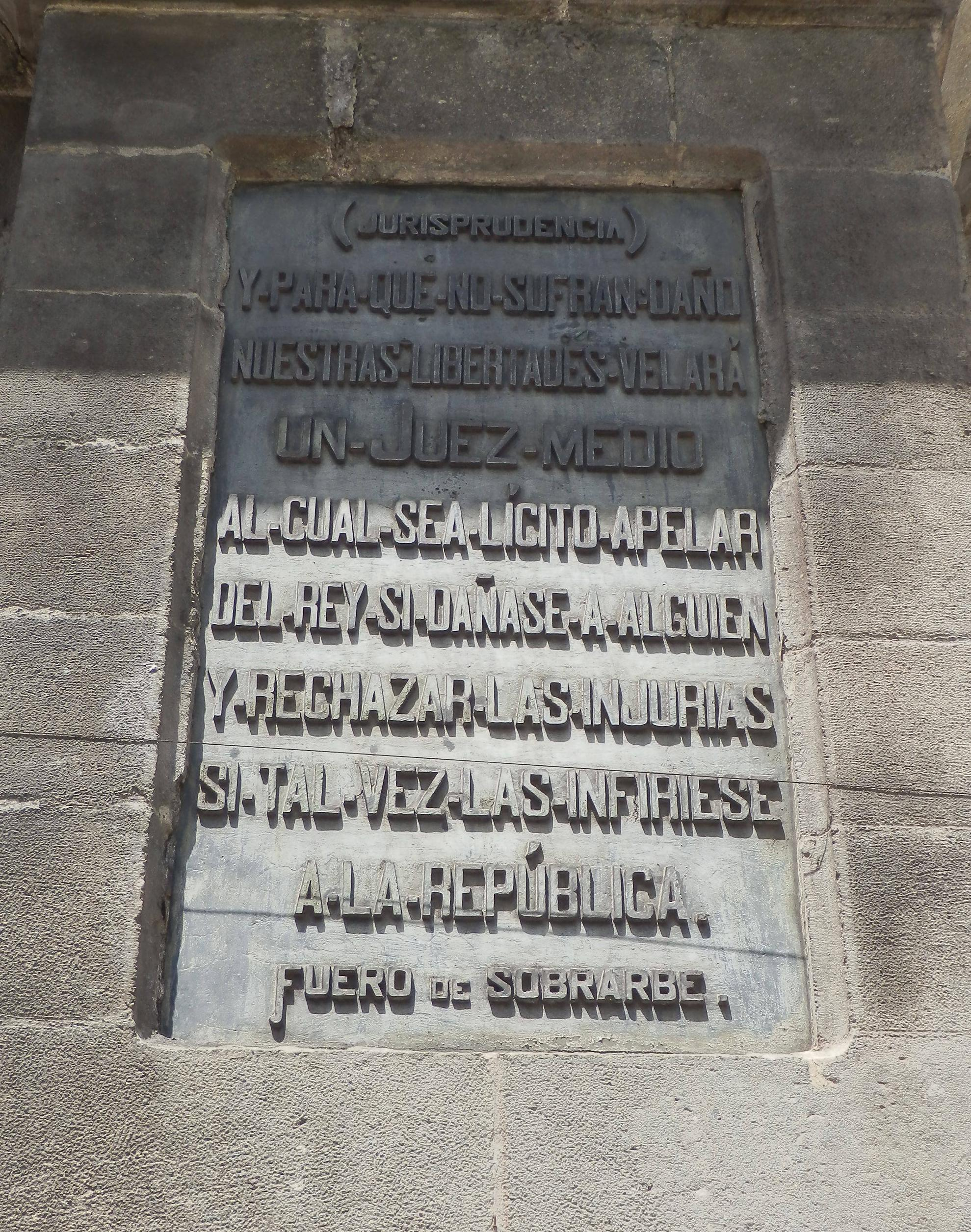 Monumento al Justiciazgo Estatua de Don Juan V de Lanuza, Justicia Mayor de Aragón ajusticiado en 1591 por orden de Felipe II Texto de un artículo del Fuero de Sobrarbe.